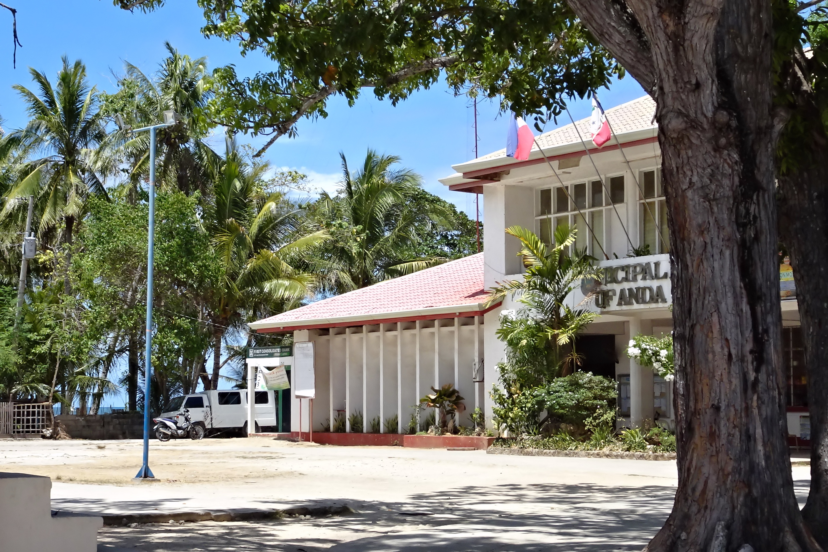 Anda, Bohol, Philippines